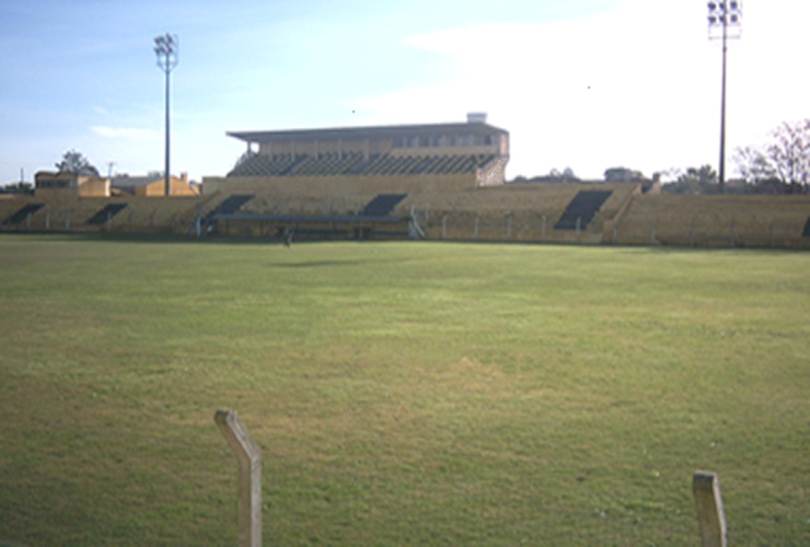 Foto com imagem parcial do estádio Pedra Moura. Bagé, Rio Grande do Sul.